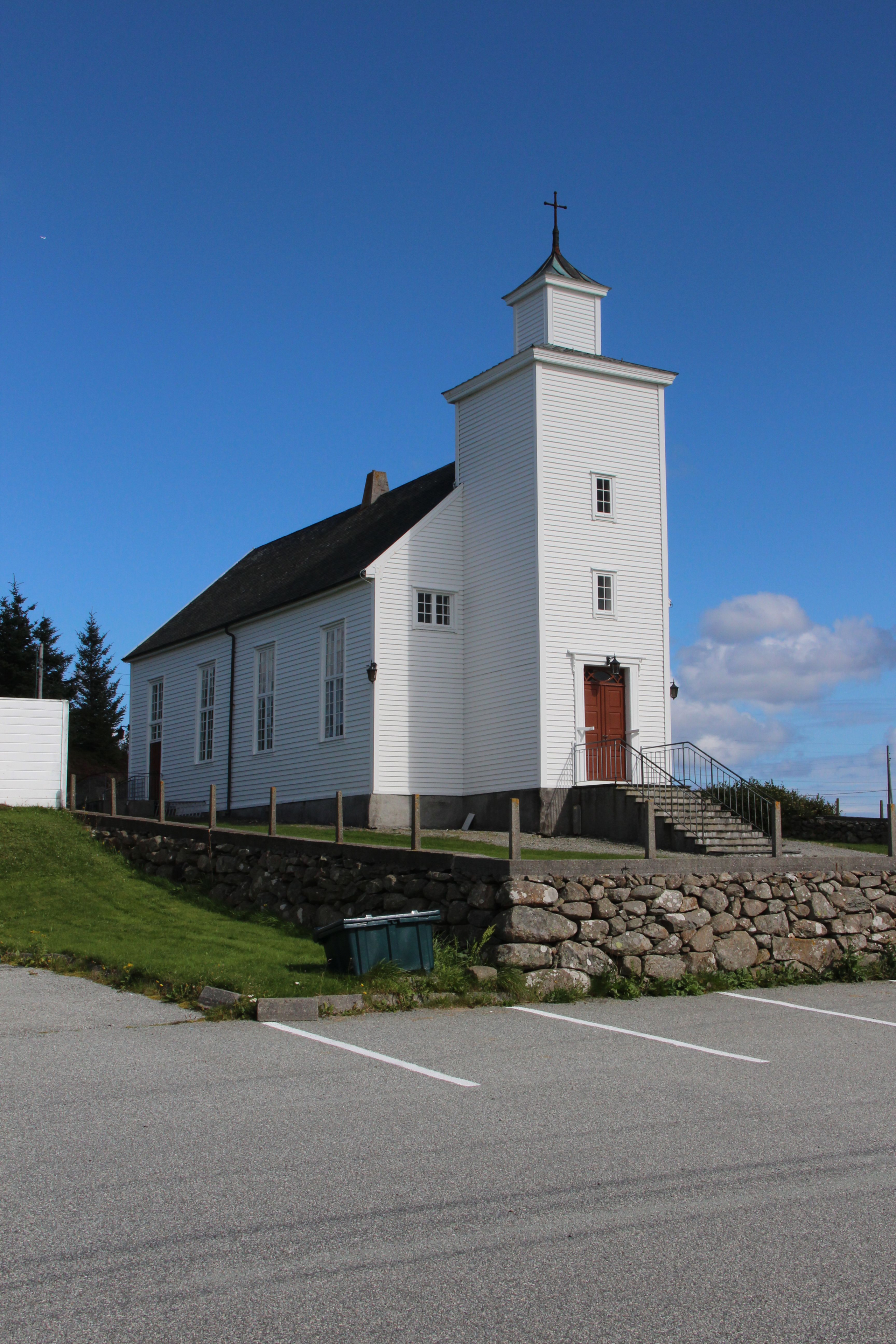 Ferkingstad kirke. Foto: Bertha Aarø. Fra Riksantikvarens Kulturminnesøk.